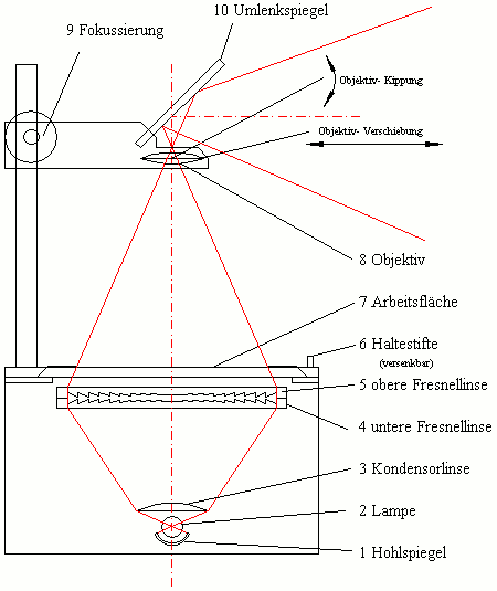 Arbeitsprojektor, Strahlengang, mit Objektiverstellung für verzeichnungsfreie Schrägprojektion und Objektivkippung für den Schärfeausgleich z.B. bei Aufwärtsprojektion auf eine senkrechte Bildwand